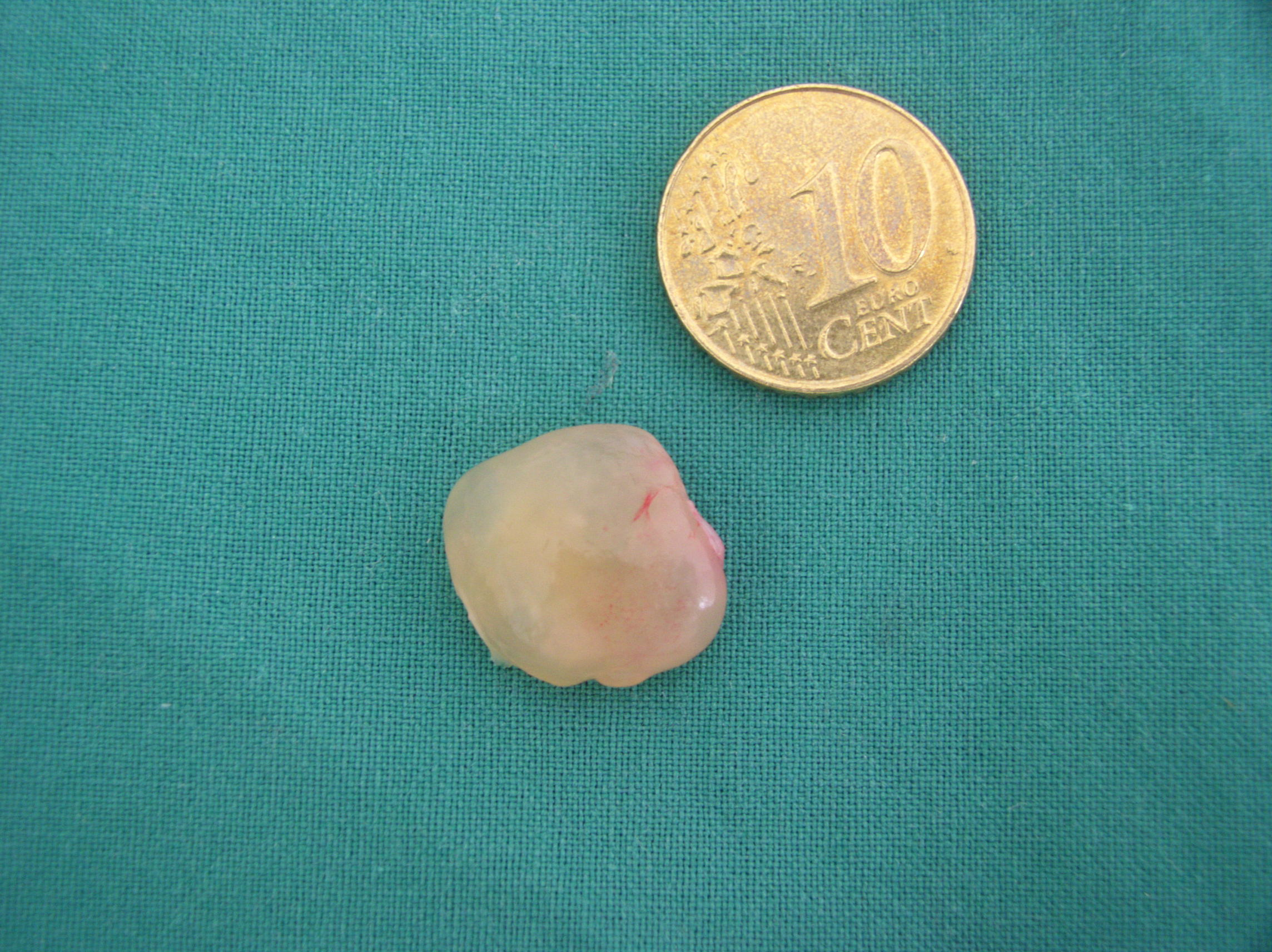 Polyposis nasi